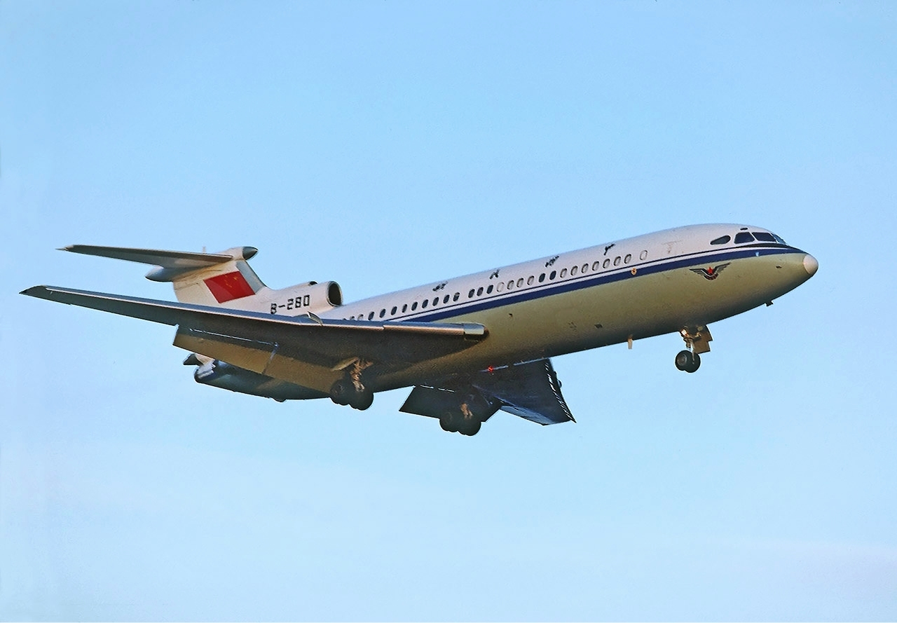 CAAC Hawker Siddeley HS-121 Trident 2E